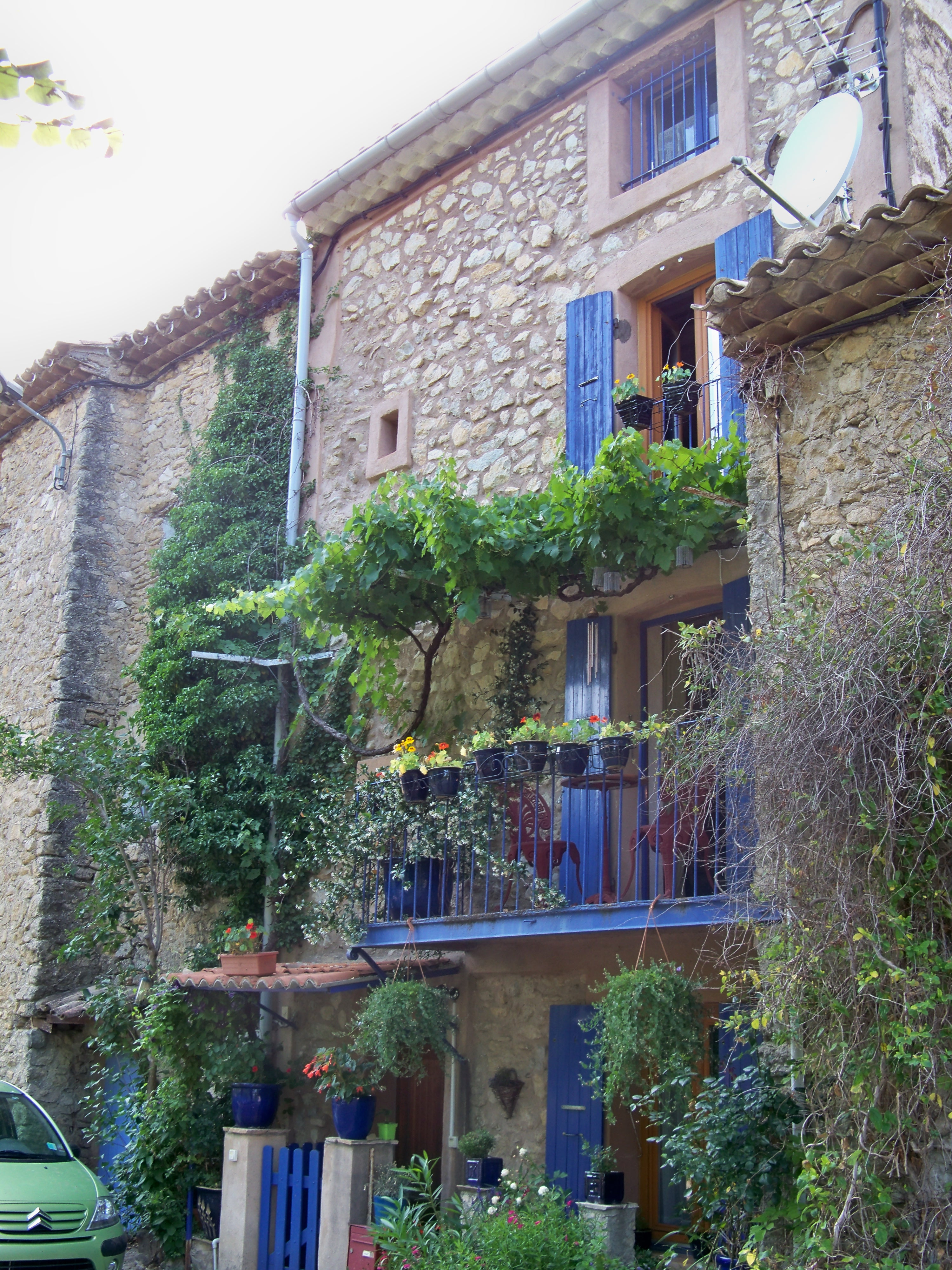 Treille en Comtat Vénaissin